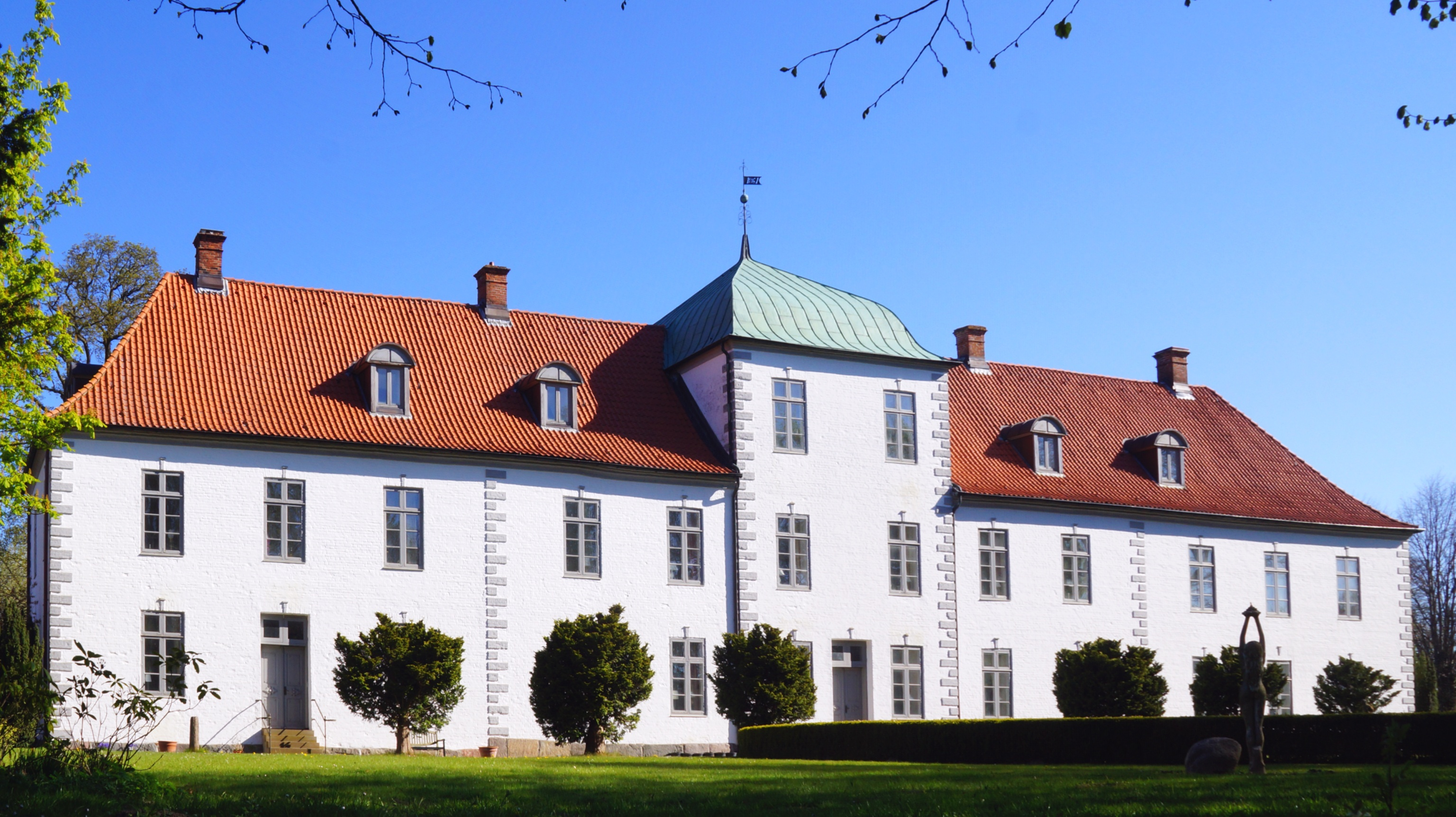 Herrenhaus Carlsburg (bzw Schloss Karlsburg so die örtlichen Bezeichnung) Kulturdenkmal in der Gutshofanlage - bis 1807 Gut Gereby - im Ort Karlsburg Winnemark Amt Schwansen Halbinsel an der Schlei Schleswig-Holstein - Foto Wolfgang Pehlemann DSC07467